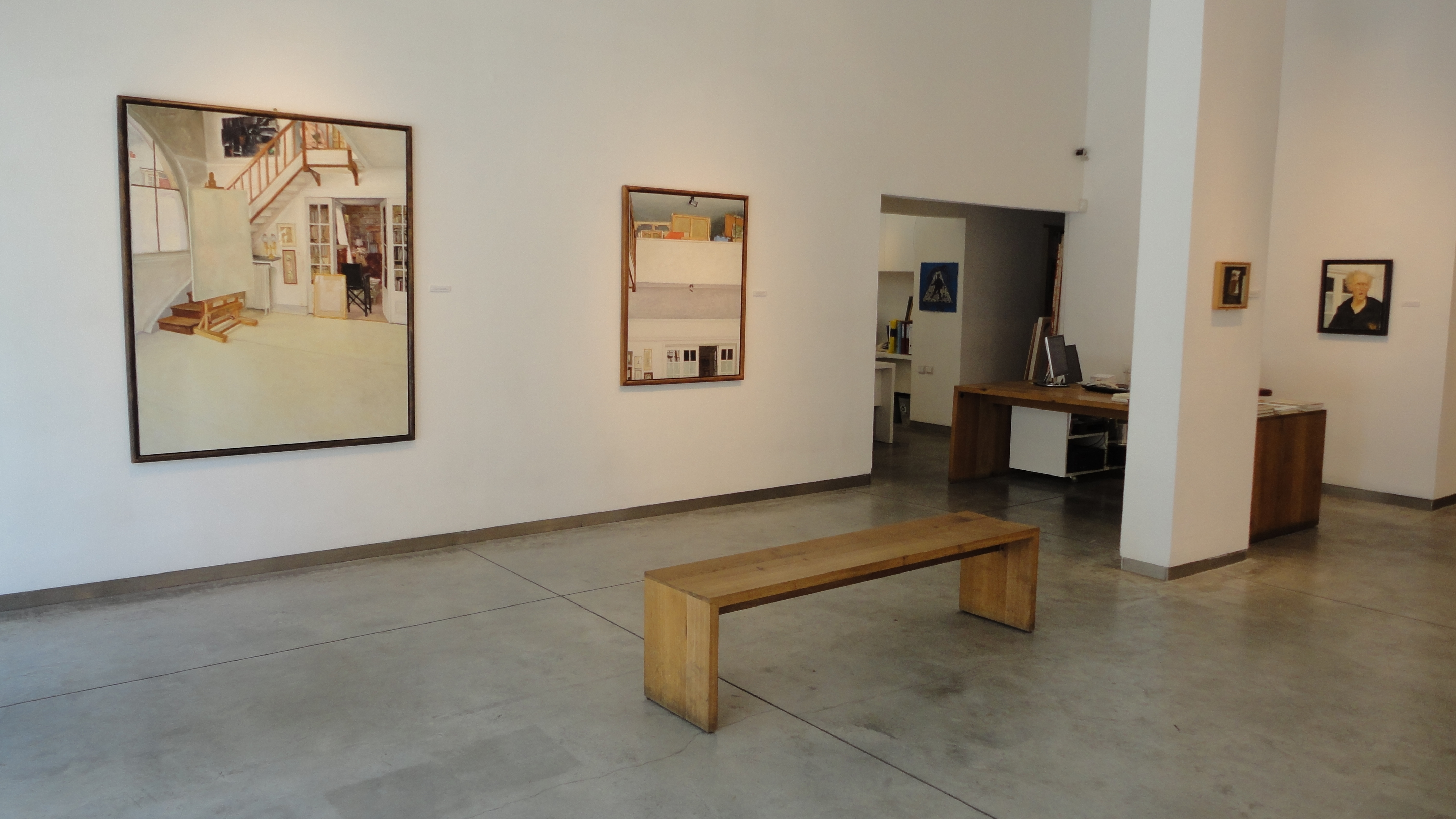 מראה גלריה גורדון. בגלריה מוצגת התערוכה "הרעב בעיניים" (2011) מעבודותיו של אביגדור אריכא.Avigdor Arikha / The Hunger in the Eye On the first anniversary of his death